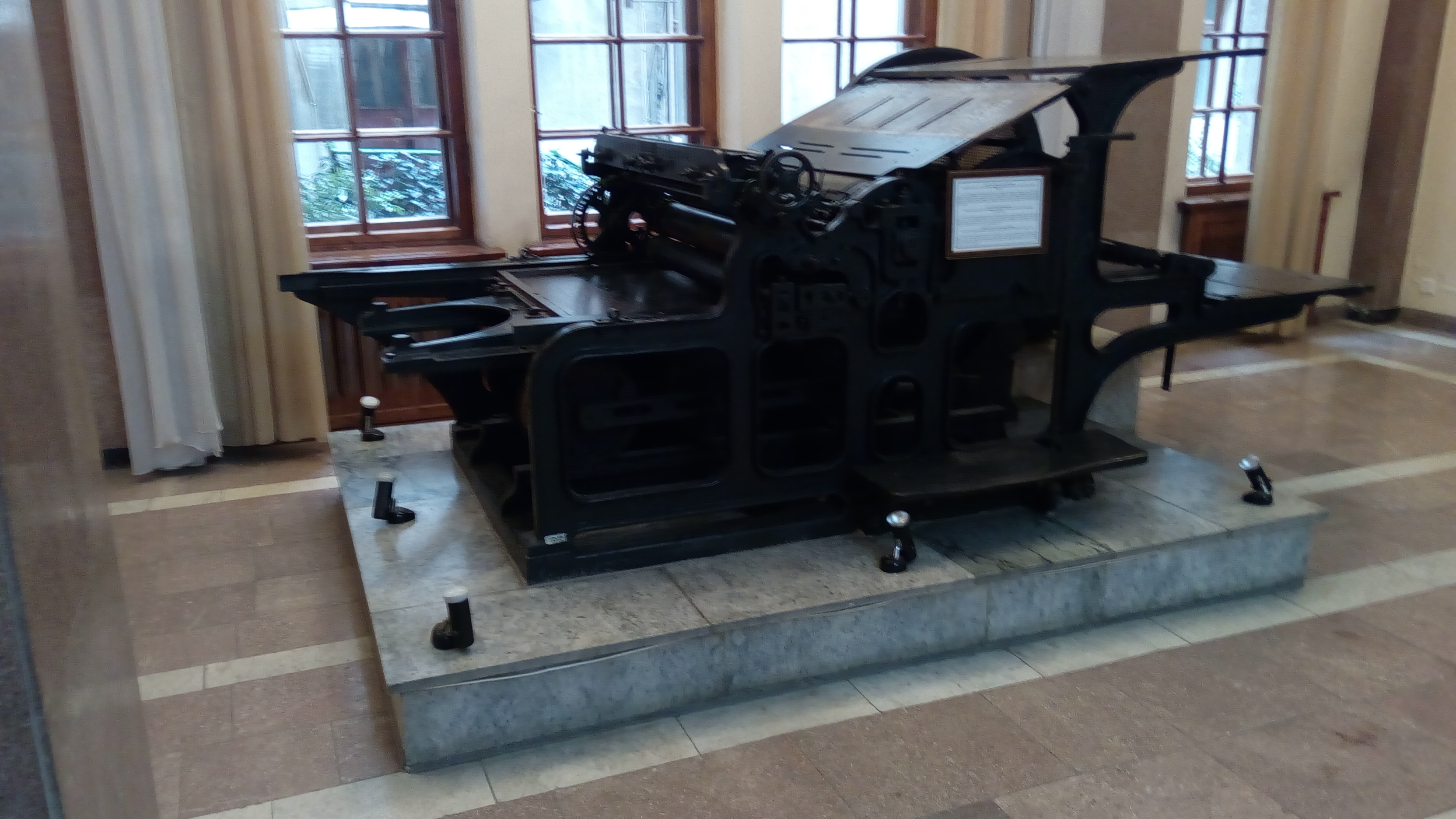 Muzey Mərkəzi